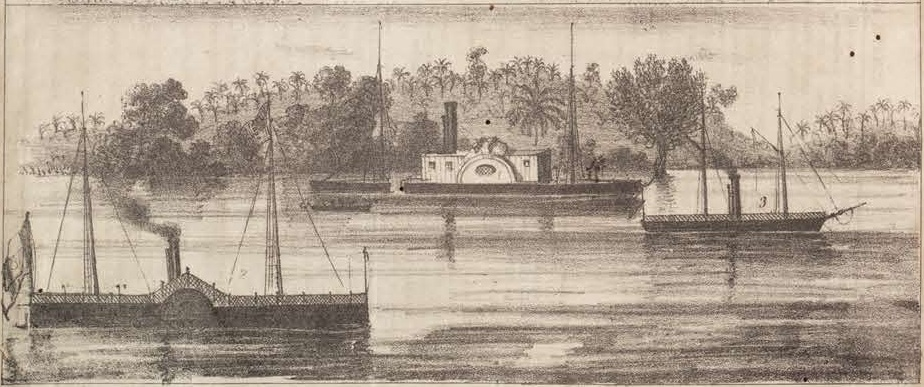 Tomada do vapor paraguaio Gualeguay no dia 25 de abril de 1866